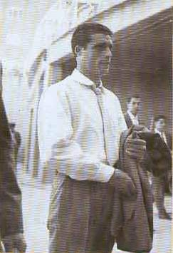 Aeropuerto de Madrid.